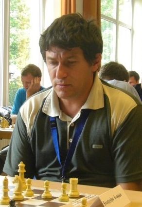 Светослав Иванов на Европейската клубна купа по шахмат, 2009 г., проведена в Германия.